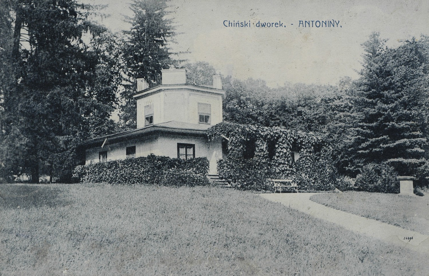 Накладом В. Кжишковського.